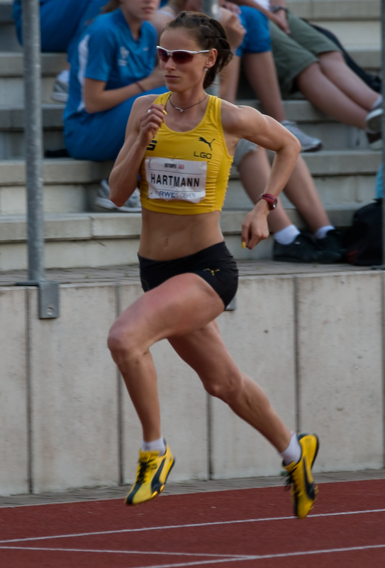 Jana Hartmann, Leichtathletin